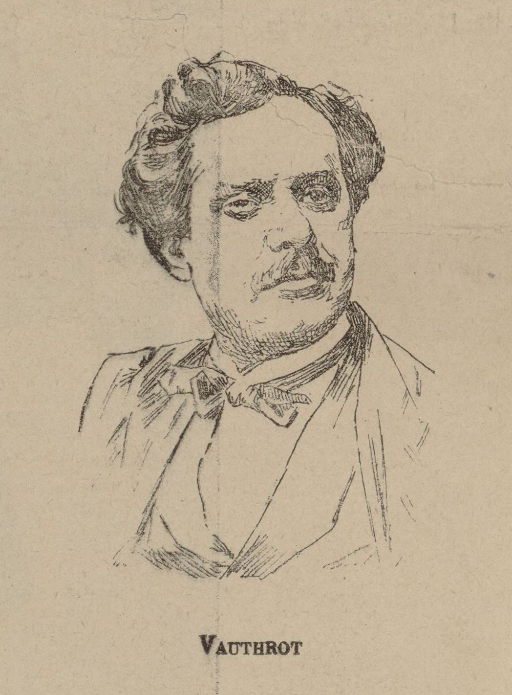 Eugène Vauthrot sur un document de Richard Wagner sur la représentation de Tannhäuser en 1861 à l'Opéra de Paris